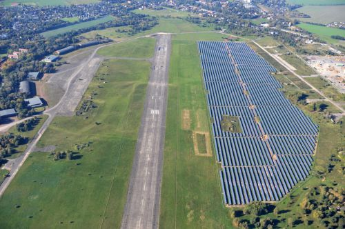 Luftbild Flugplatz Werneuchen im Bundesland Brandenburg